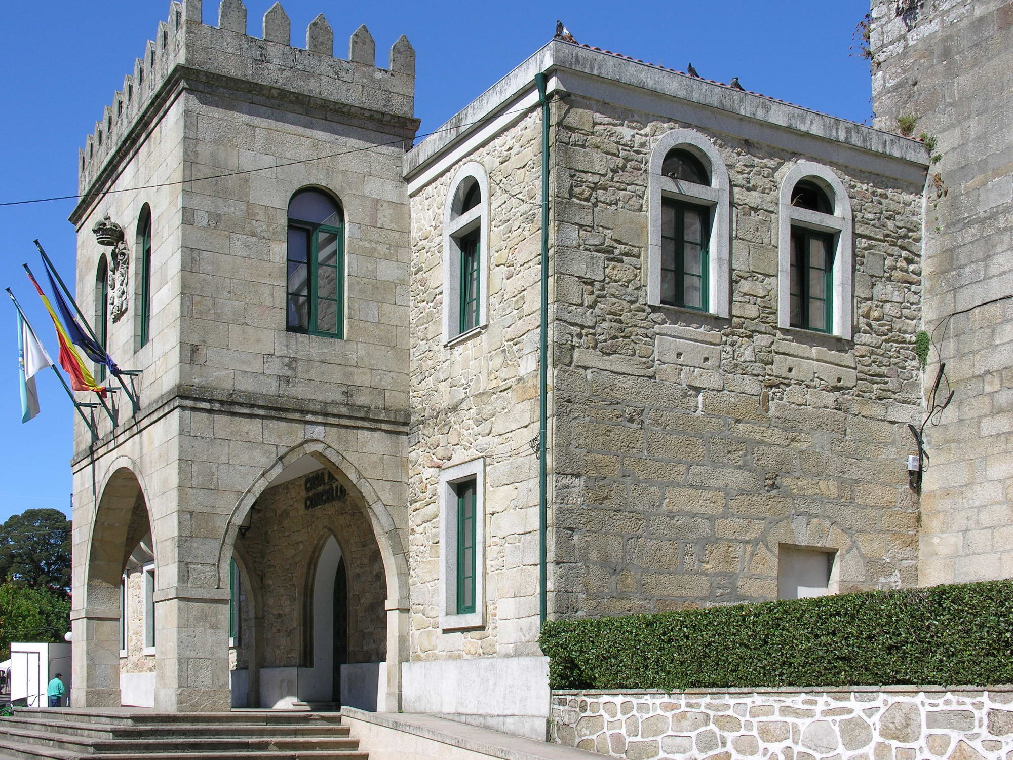 Concello, Noia, Galicia